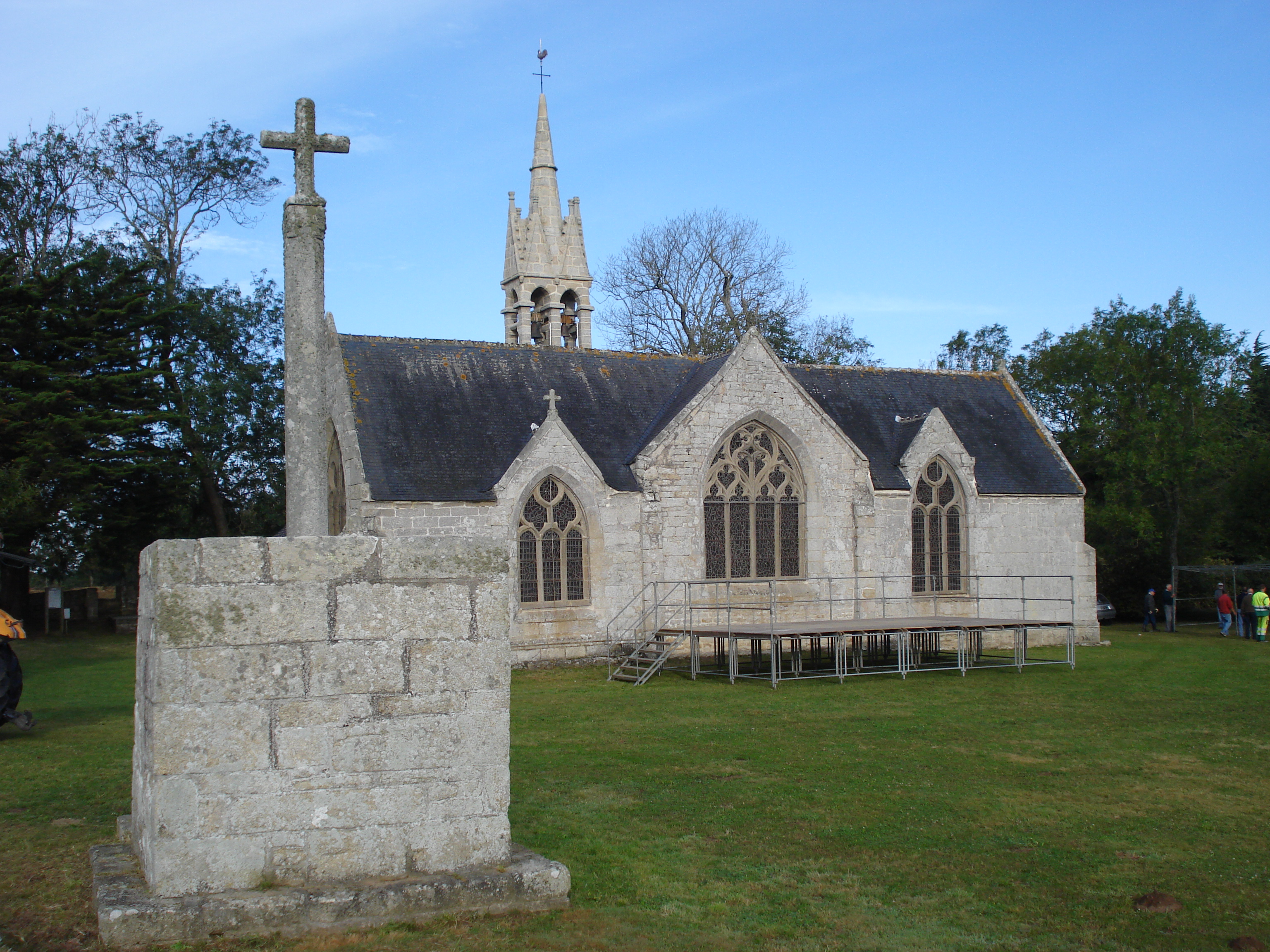 Chapelle Notre-Dame de Tréminou, commune de Plomeur, Finistère, Bretagne, France